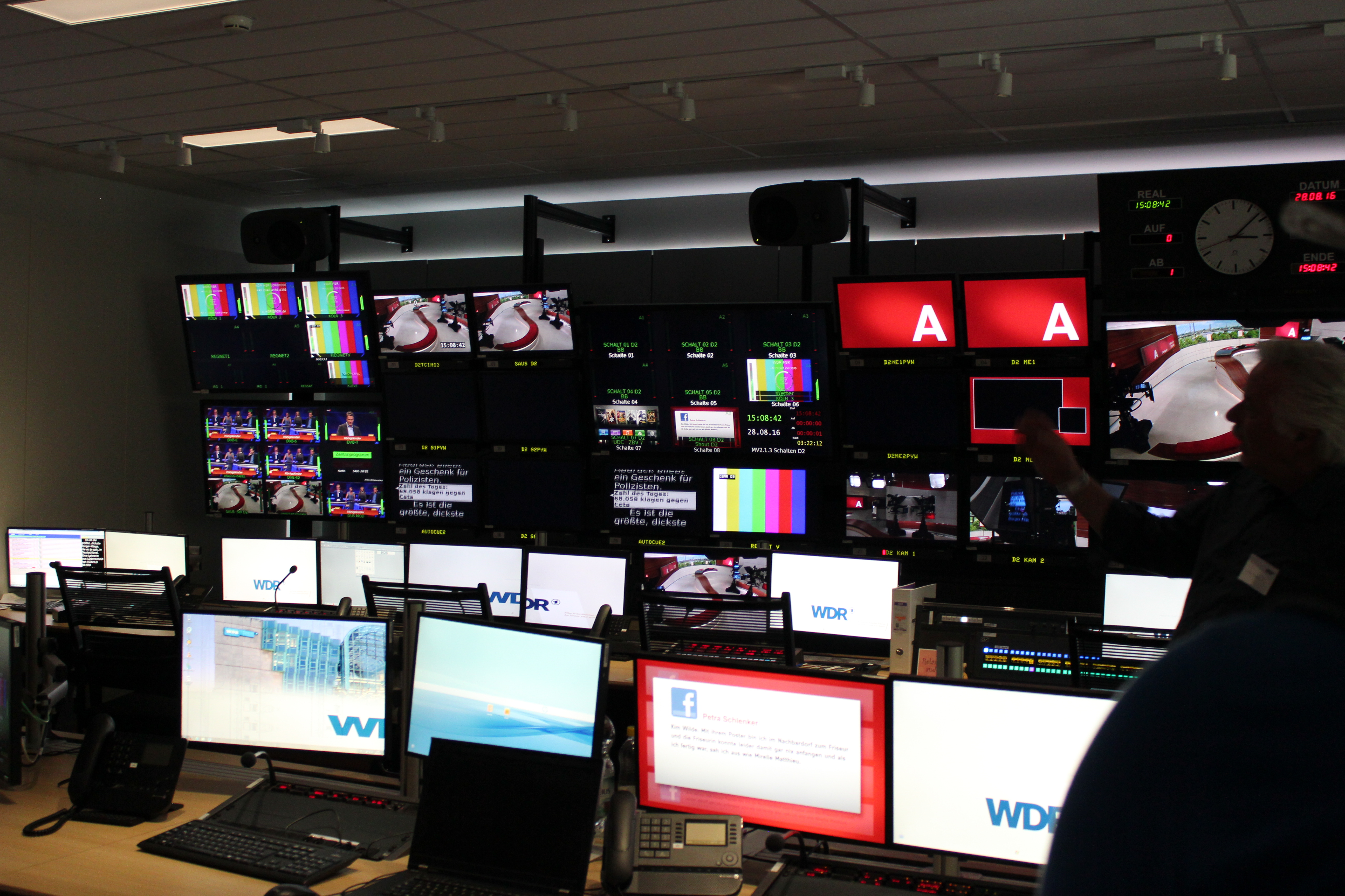 Hier sieht man die Riege aus der die Nachrichten Sendungen des WDR gesteuert werden